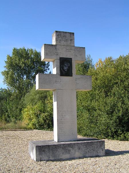 Monument à Claude Bonnier, résistant, à Vibrac (Charente, France), île de l'écluse